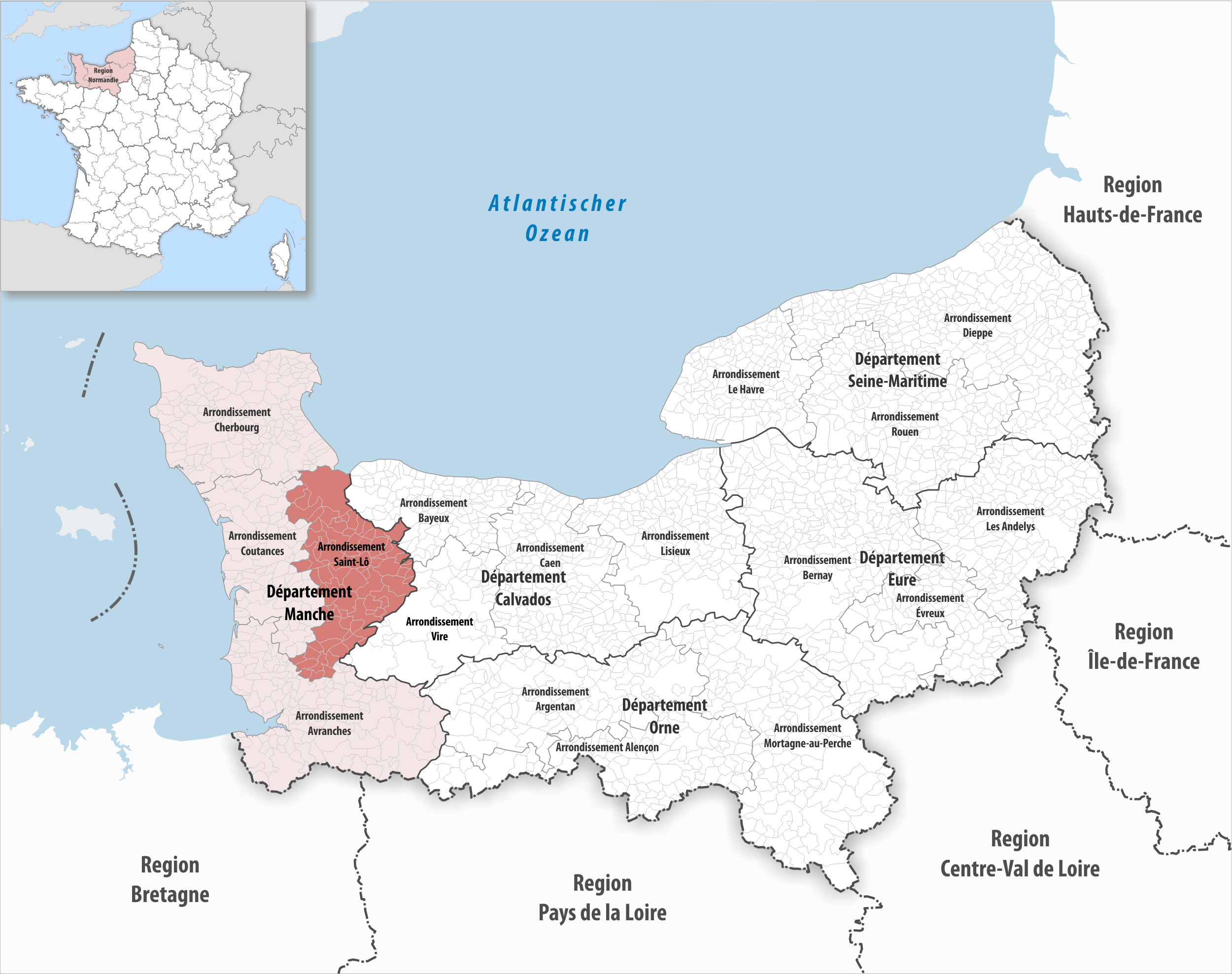 Lage des Arrondissements Saint-Lô